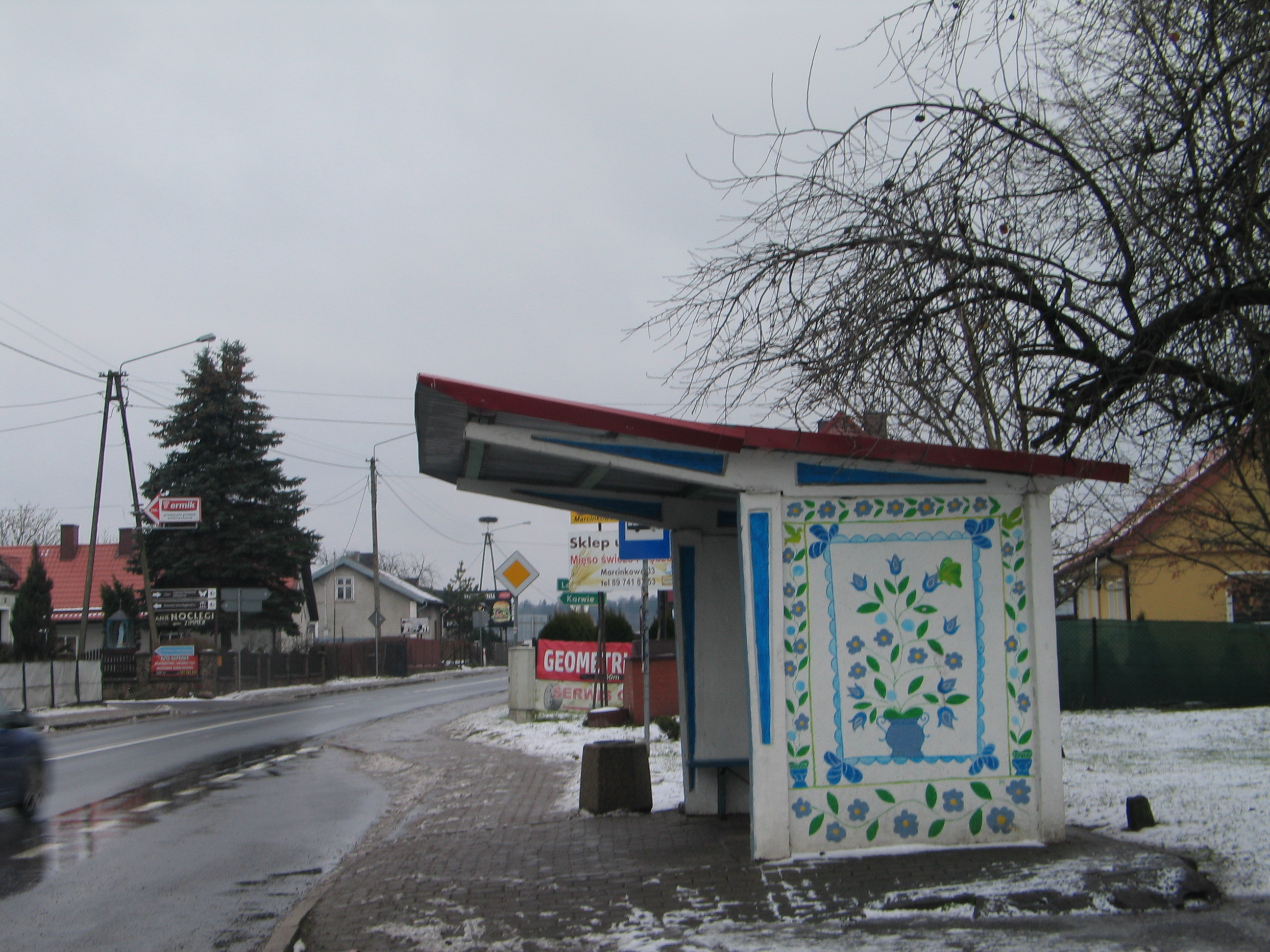 Автобусная остановка в селе Марцинково (Польша)